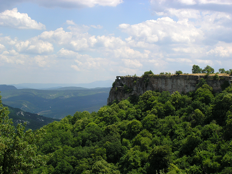 Mangup, Crimea